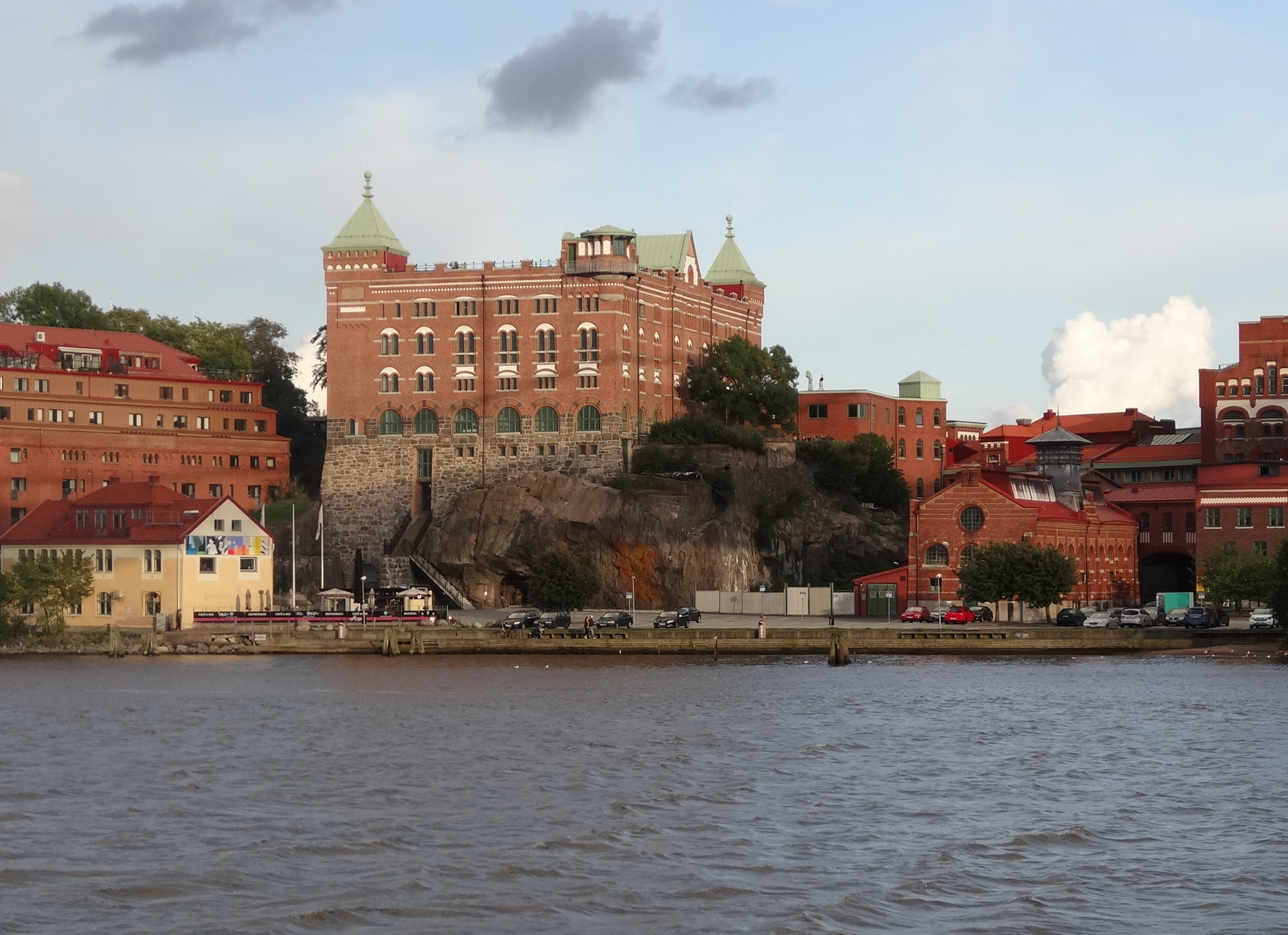 Toppsockerfabriken, Klippans Kulturreservat i Göteborg, sett från Göta älv.